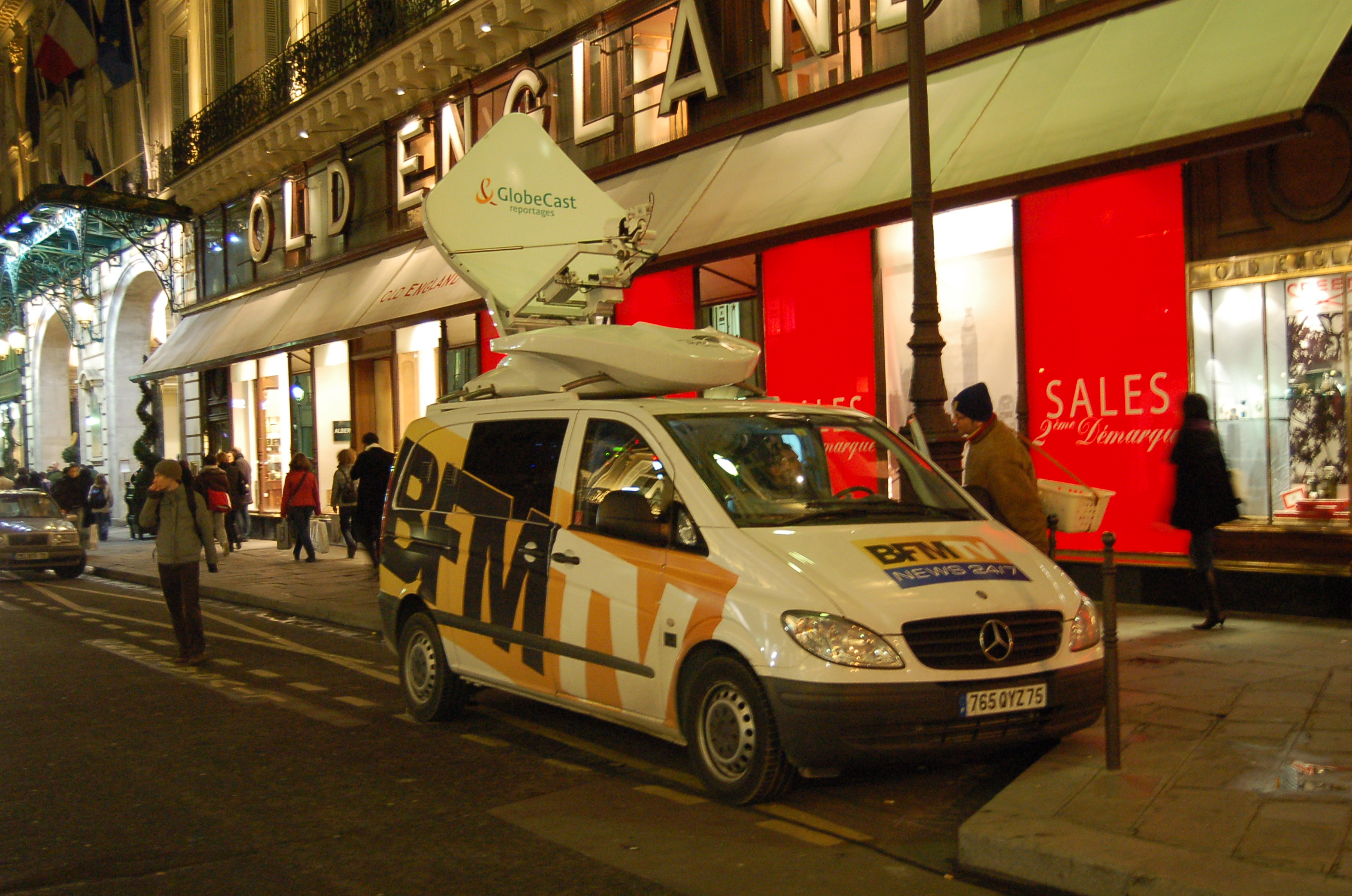 Un véhicule satellite (« V.S. ») de la chaîne française d'information en continu BFM TV près de l'Opéra Garnier à Paris après une manifestation contre la guerre de Gaza le 17 janvier 2009.